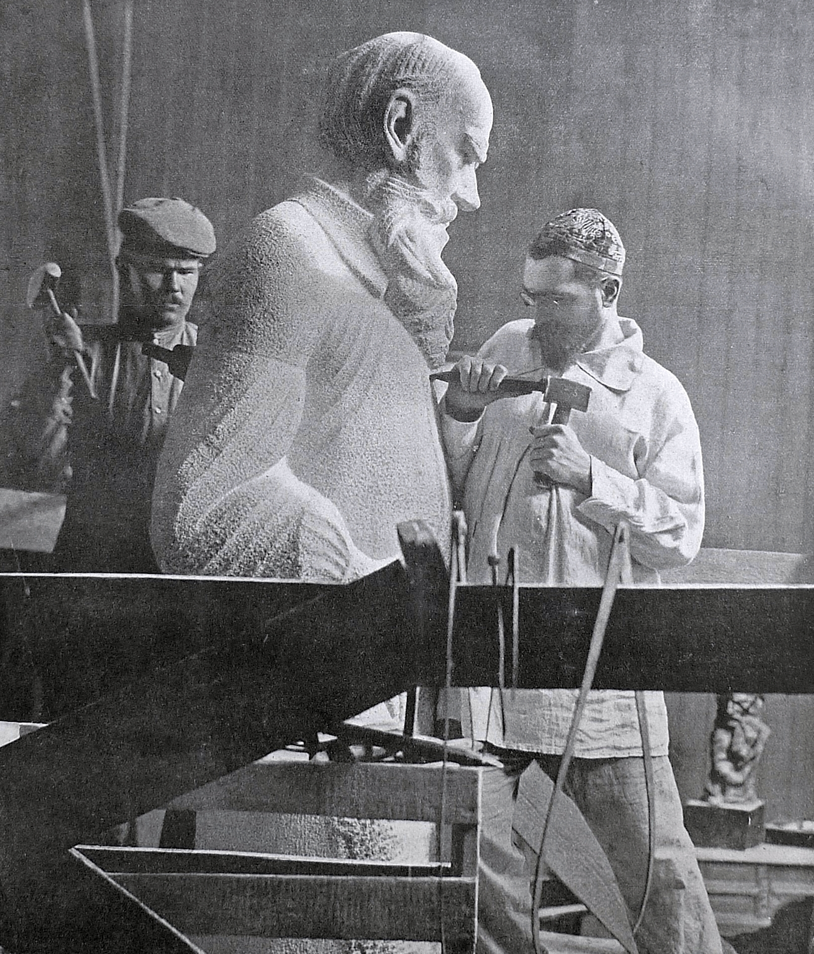 Скульптор С.Д. Меркуров заканчивает работу над памятником Л.Н. Толстому